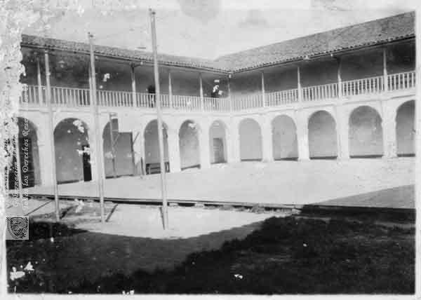 COLEGIO SANTA LIBRADA DE CALI. COVENTO DE SAN AGUSTÍN, EN LA CALLE 13, CARRERAS. 3a. y 4a.. Esta fue su primera sede y a partir de 1942 se trasladó a la sede actual. SANTIAGO DE CALI, C. 1940. (2000). COLEGIO SANTA LIBRADA DE CALI & 202476. SANTIAGO DE CALI: Biblioteca Departamental Jorge Garces Borrero.Tomado de (